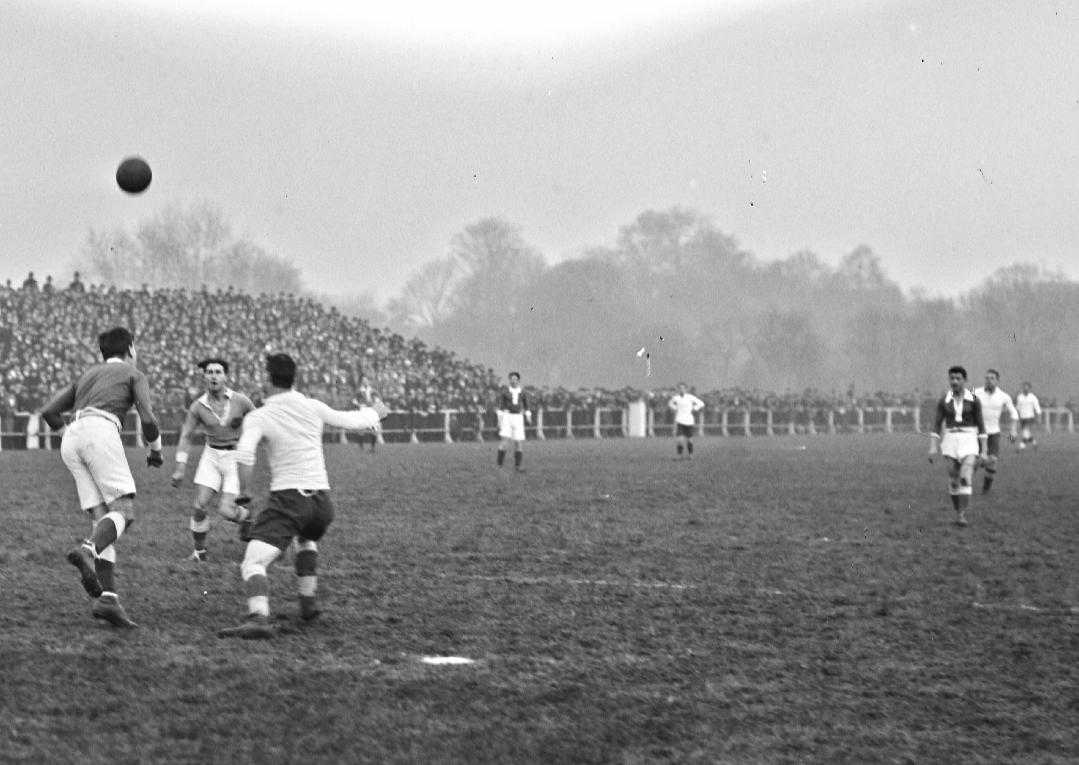 Match Olympique contre le Real Unión Club de Irun le 25 décembre 1920 au stade Bergeyre.